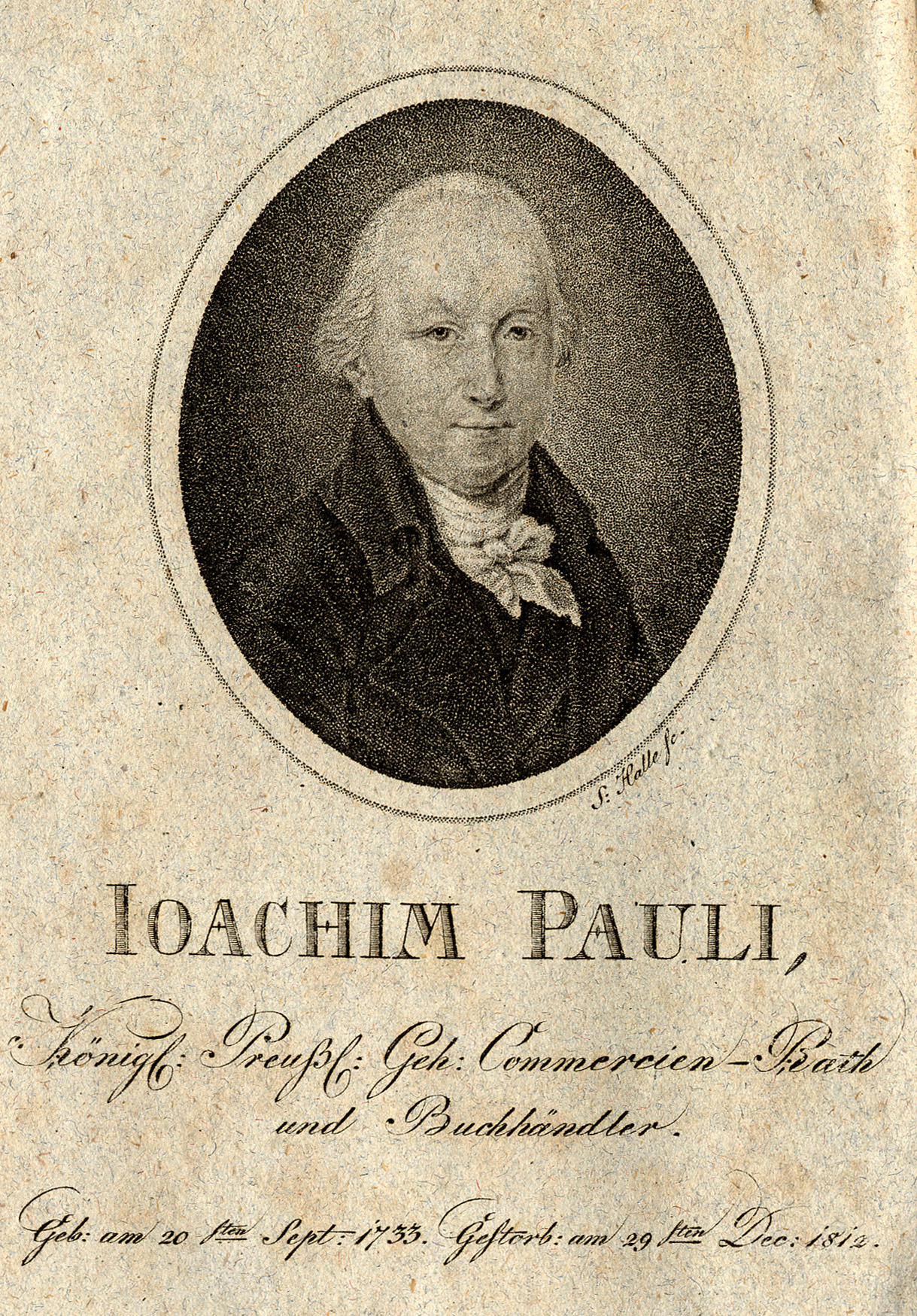 Porträt des Berliner Verlegers Joachim Pauli (1733-1812), gestochen von S. Halle. Frontispiz zu Band 123 der in Paulis Verlag erschienenen Oekonomisch-technologischen Encyklopädie von Johann Georg Krünitz